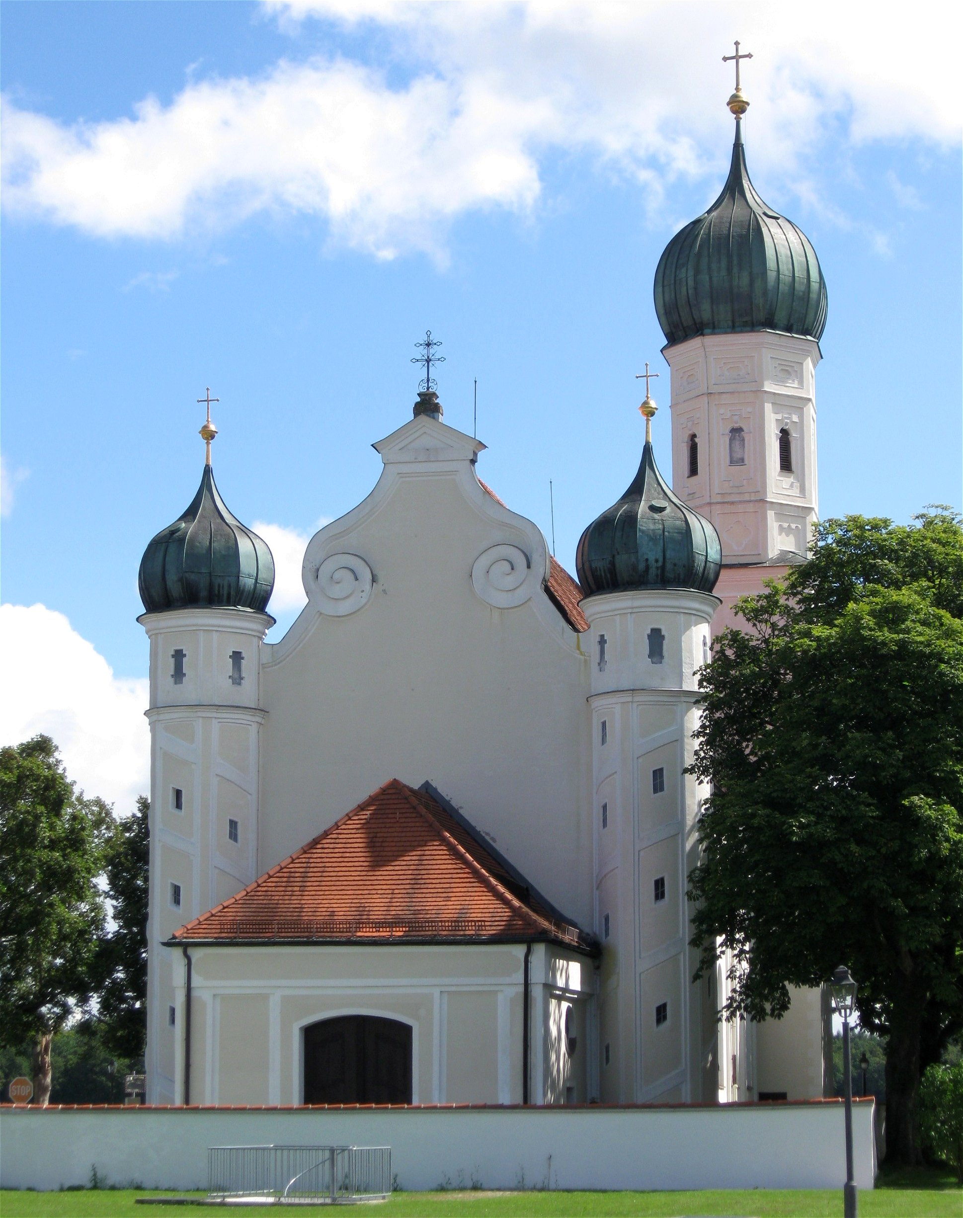 Katholische Wallfahrtskirche St. Ottilia, Möschenfeld, frühbarocker Saalbau mit Blendarkaden, stark eingezogenem Polygonalchor mit Chorflankenturm und zwei Treppentürmchen an der Westseite. Von Balthasar Wölkhamer unter Verwendung mittelalterlicher Mauern errichtet, ab 1640. Friedhofsmauer mit barocken Torpfeilern. D-1-84-121-10